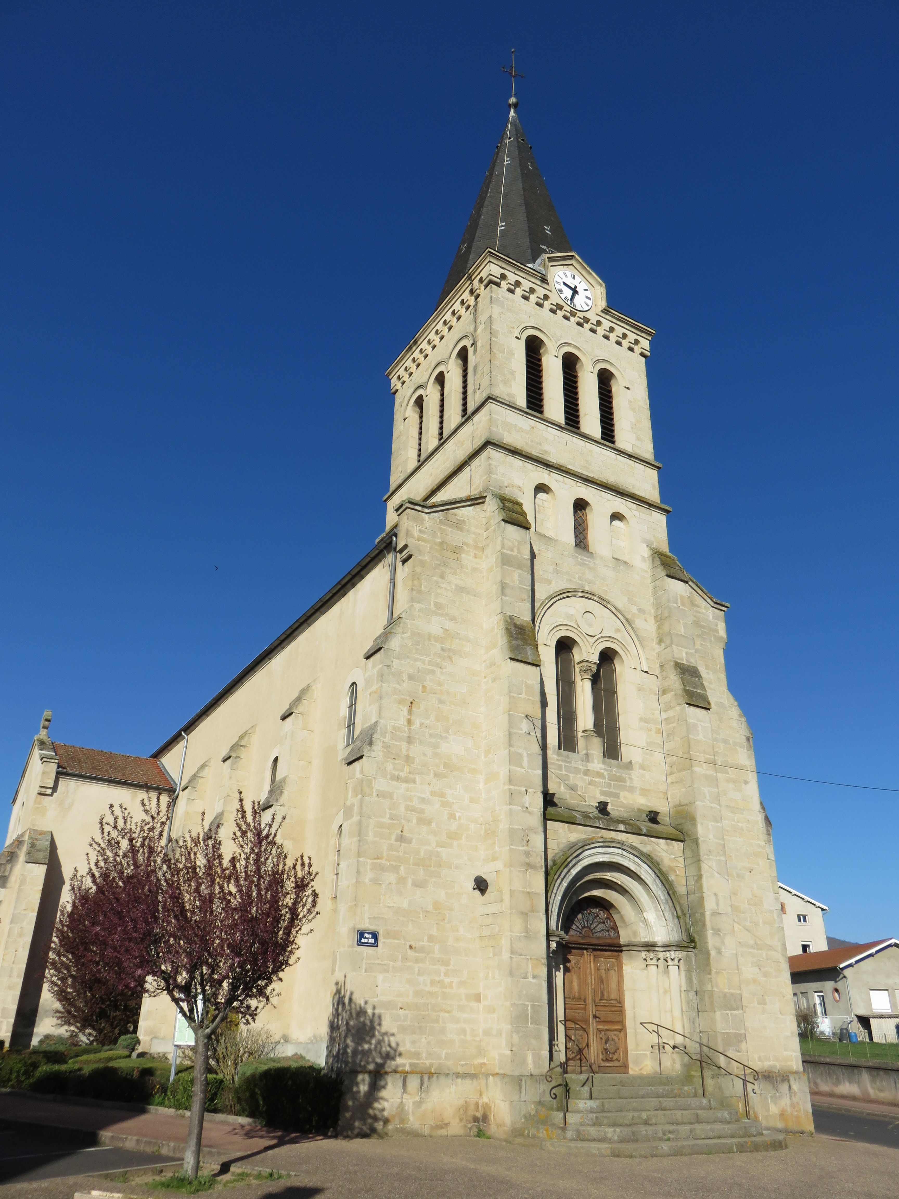 Clocher de l'église Saint-Vincent de Saint-Vincent (Haute-Loire, France).